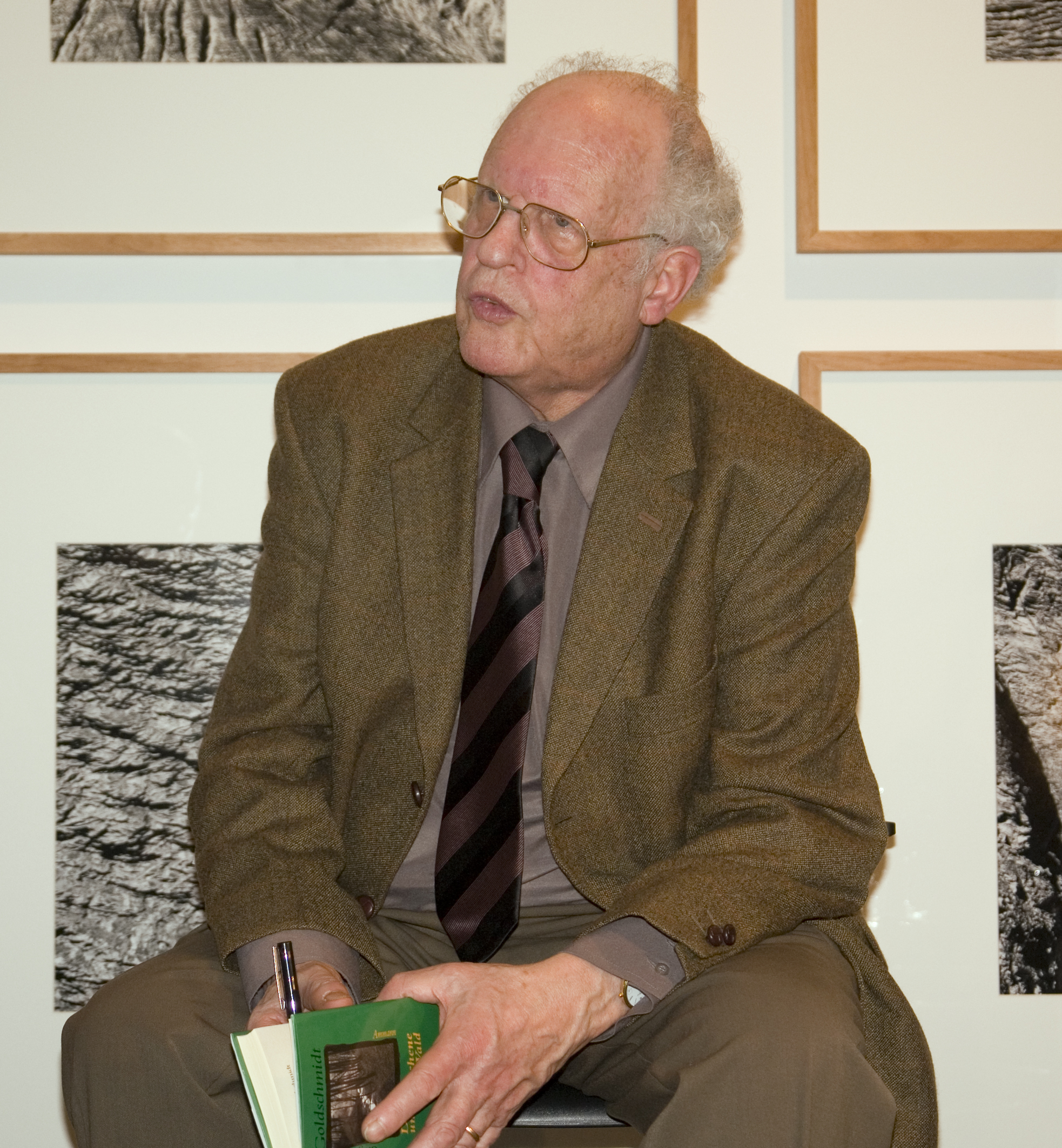 Georges-Arthur Goldschmidt, deutsch-französischer Schriftsteller (german-french author)